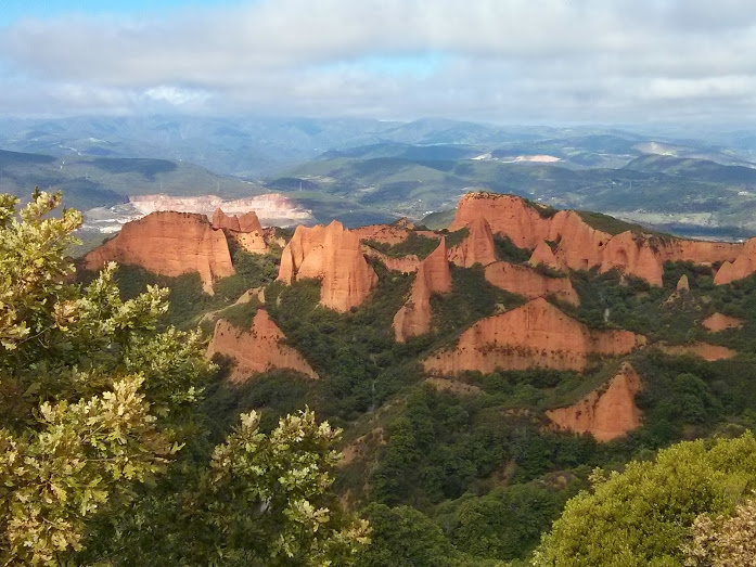 Vista Panorámica de Las Médulas.